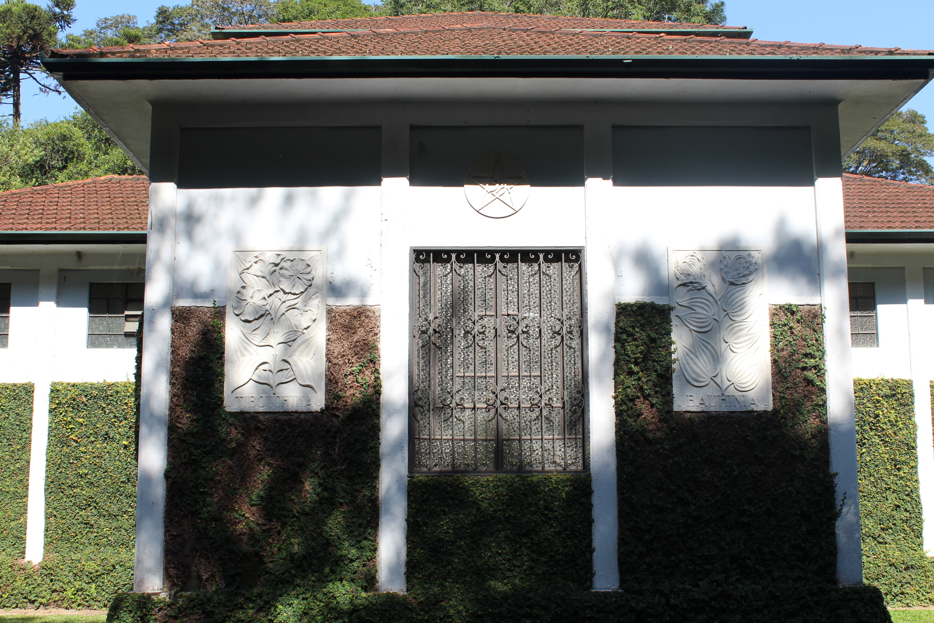 Vista da parte de trás do museu